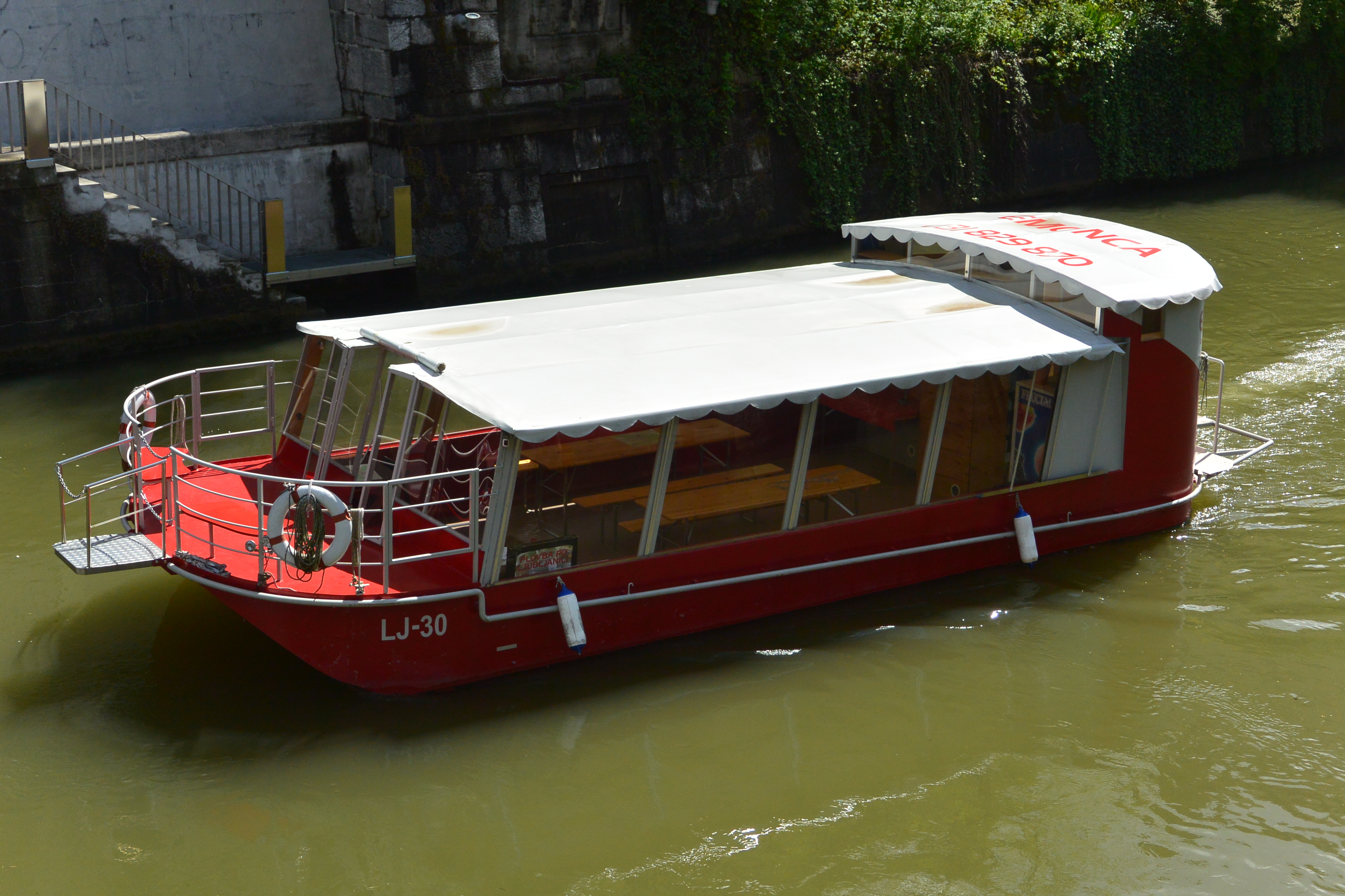 Laibach